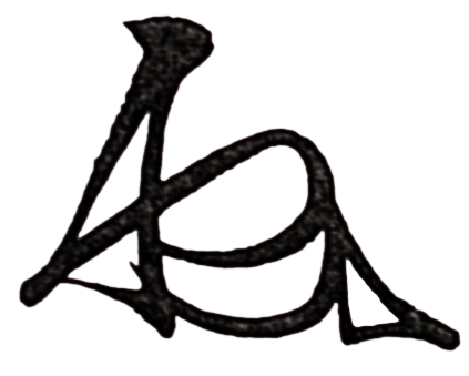 Kō no Morofuyu's kaō (signature)